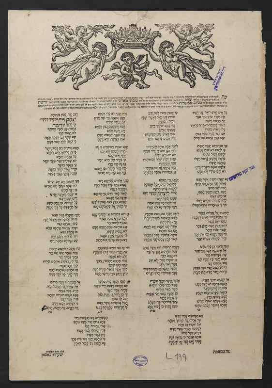 עת לטעת : ... [לחתונת] כמה"ר יצחק ... בן ... שבתי מאריני נר"ו והכלה / ... מר' יודיטה מב"ת בת ... כמה"ר מנחם מאיטליה ...